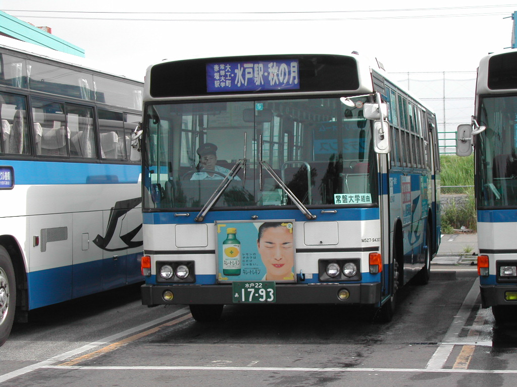 水戸支店にて、許可を得て撮影